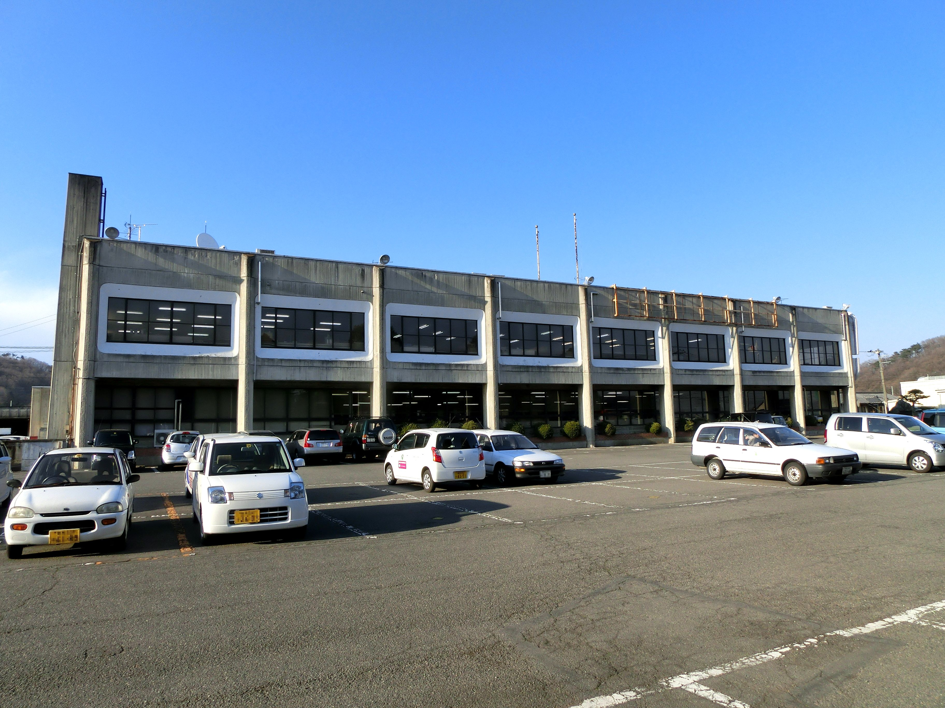 みどり市役所（笠懸庁舎）